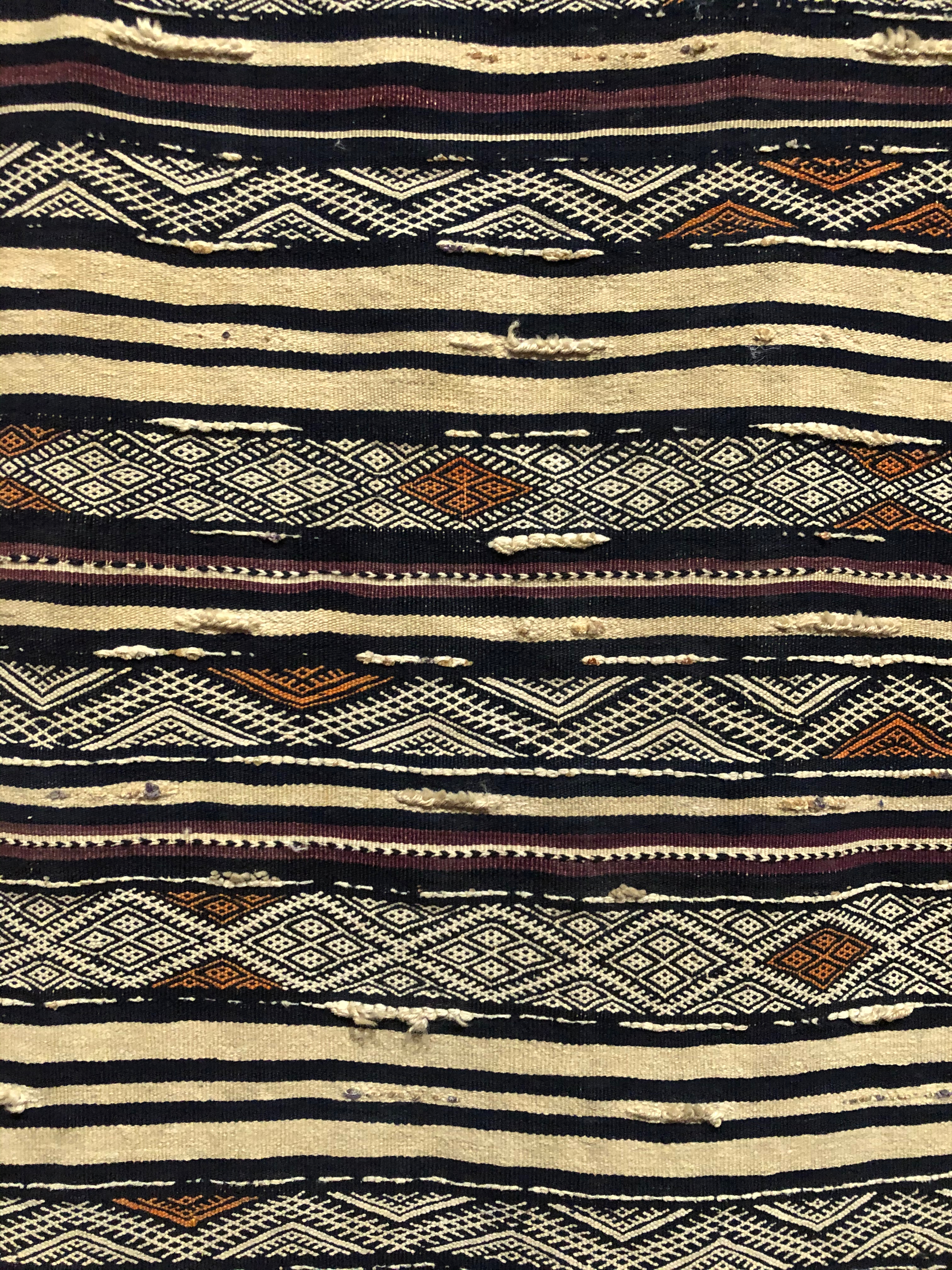 حنديرا للنساء. آيت وراين، الأطلس المتوسط. المغرب. 1900-1950. صوف. بيرت فلينت. متحف تيسكوين، مراكش. من معرض كنوز الإسلام في إفريقيا بمتحف محمد السادس للفن الحديث والمعاصر بالرباط، عام 2019